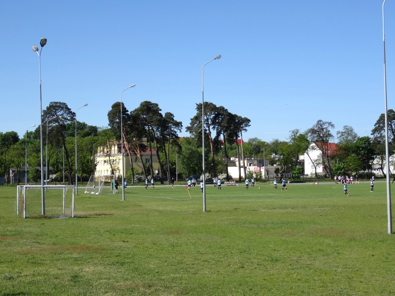 Stadion klubu Gwiazda Bydgoszcz przy ul. Nakielskiej